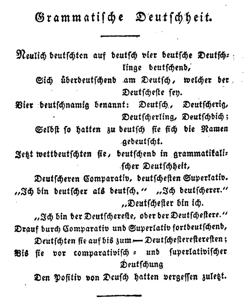 Friedrich Rückert: Grammatische Deutschheit, parodistisches Gedicht in elegischen Distichen